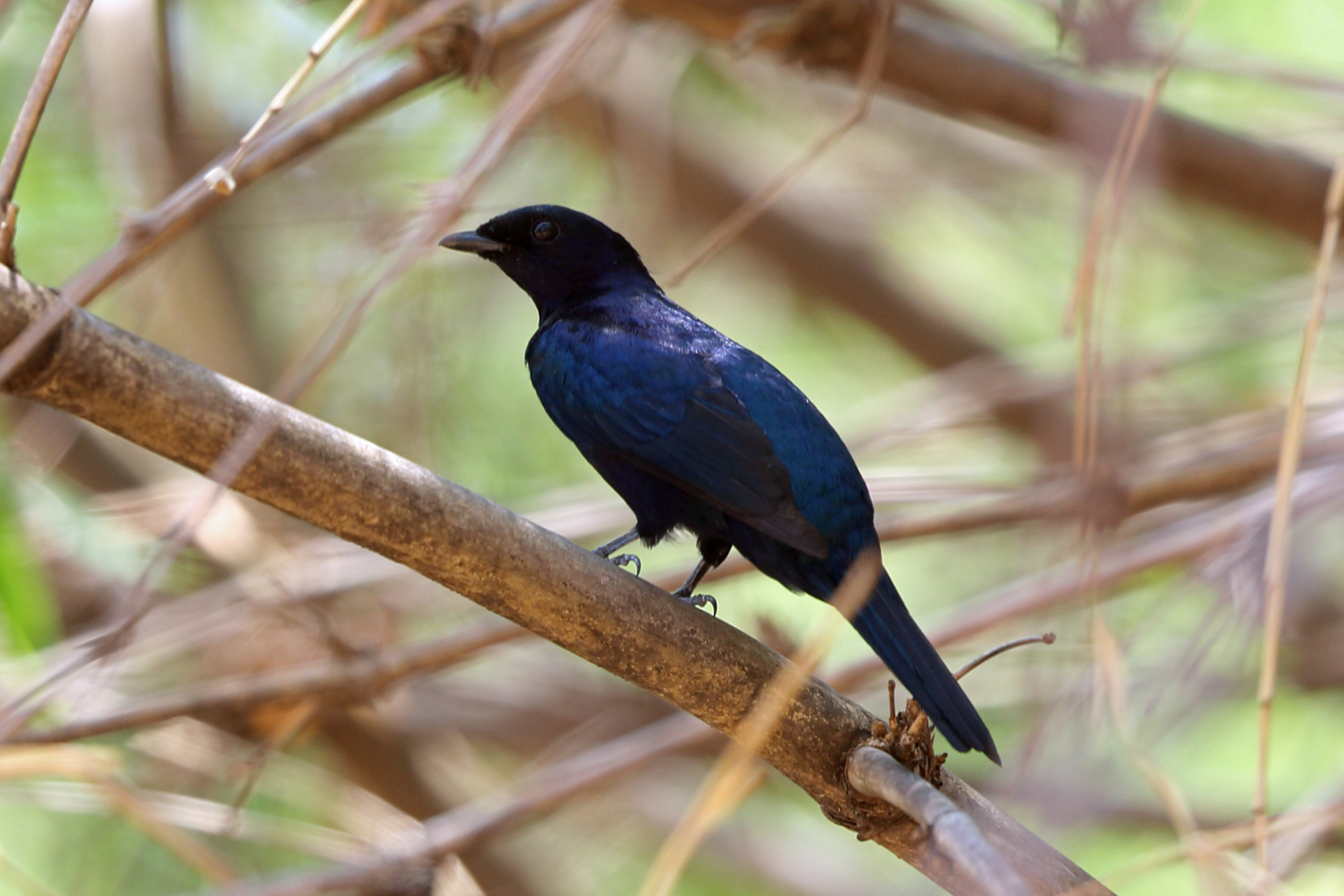 Male